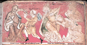 Blancheflour verneemt van de dood van haar man